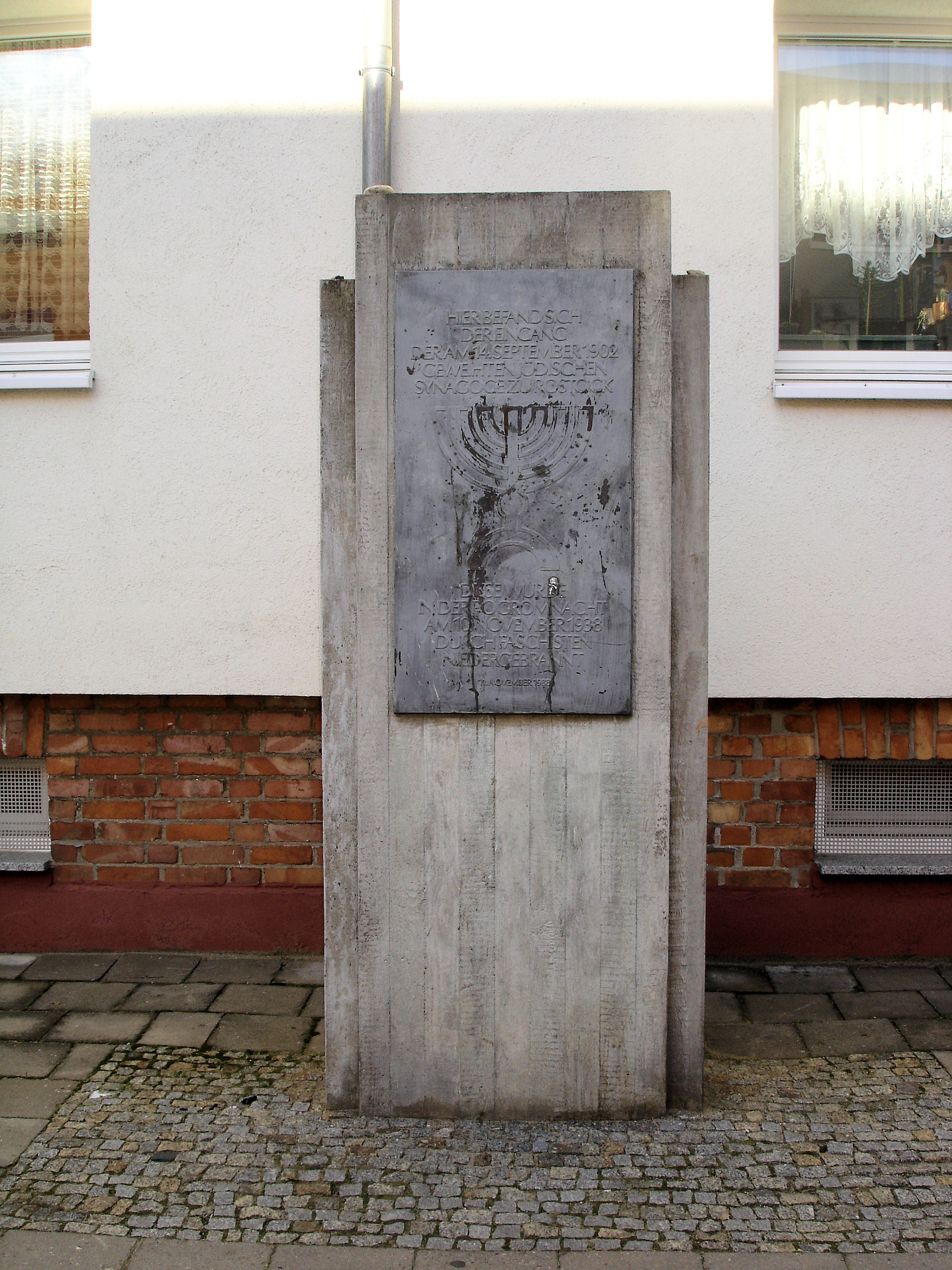 Gedenkstele für die Synagoge in Rostock / Memorial-stele synagogue